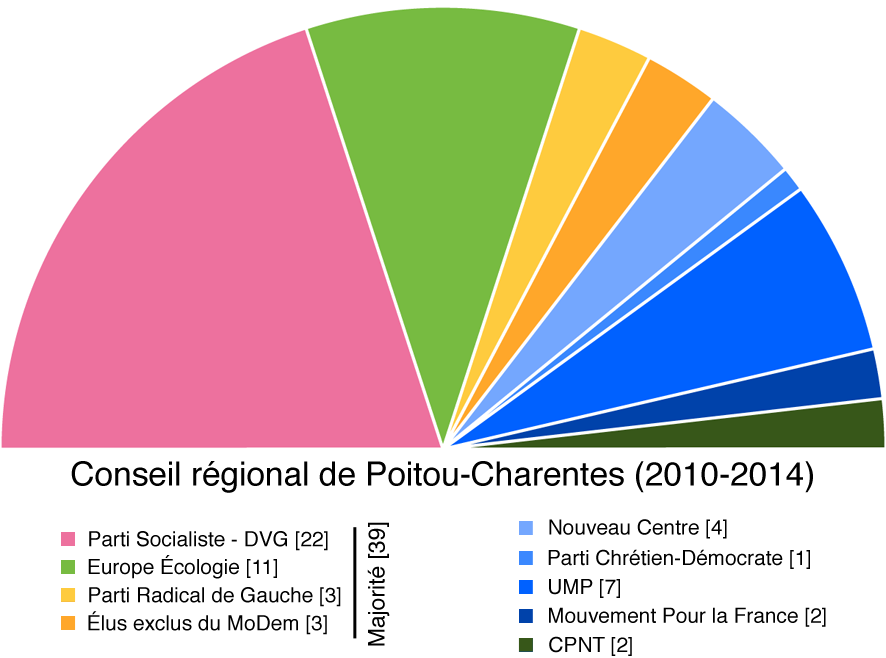 Composition du conseil régional de Poitou-Charentes après les élections régionales françaises de 2010